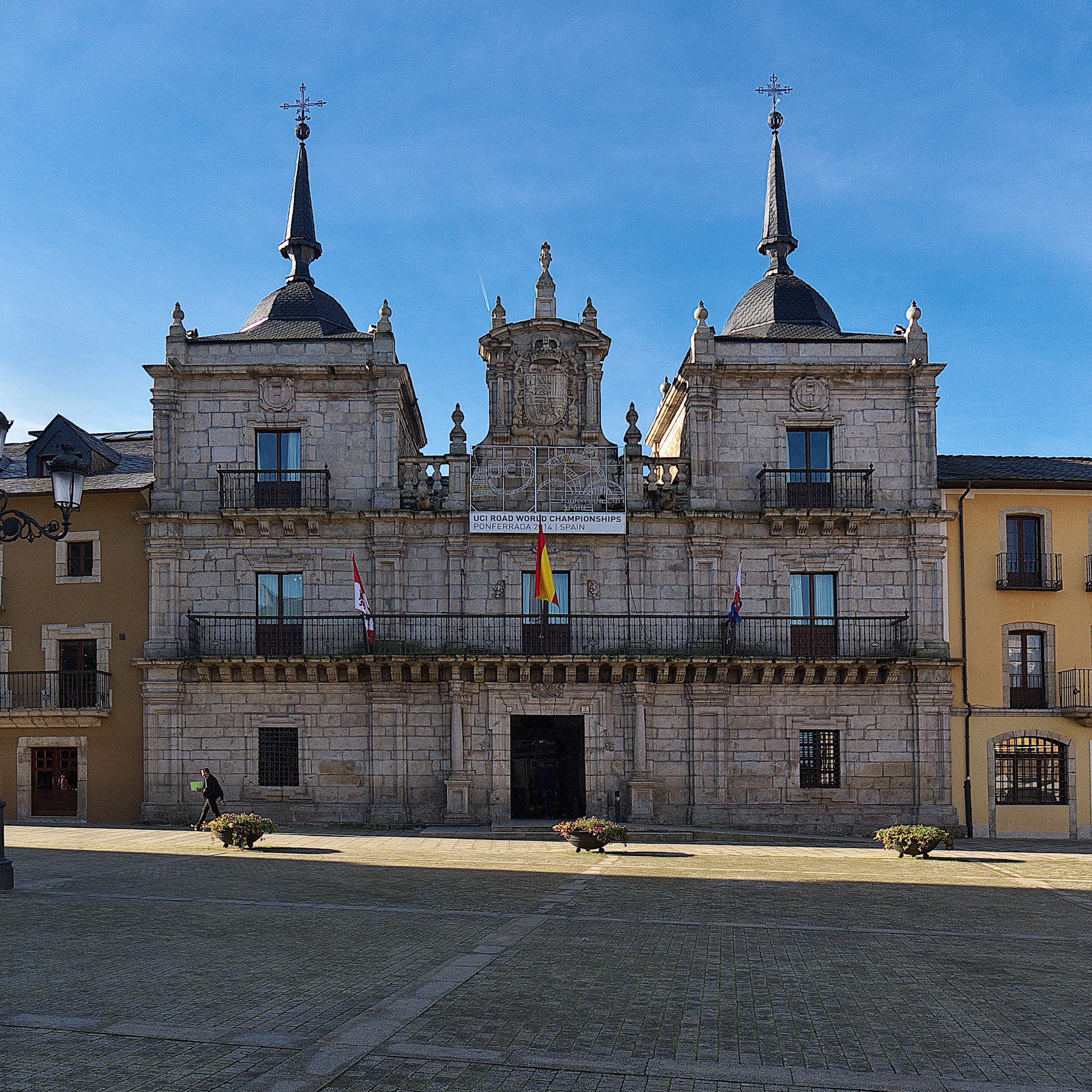 Un edificio de Pedro de Arén (1631-1699), construído a finales del siglo XVII.